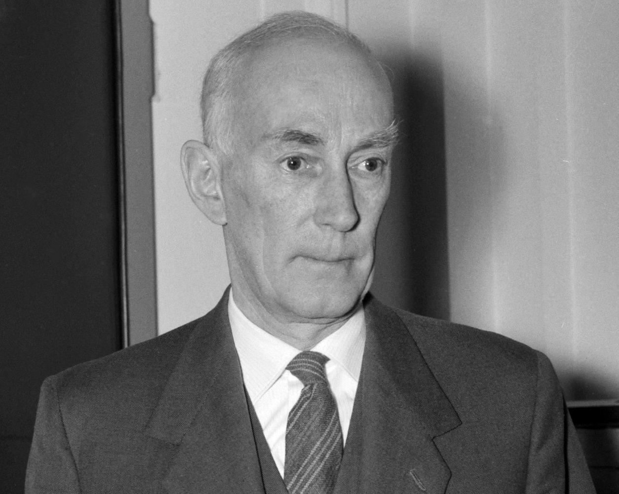 Jan Oort.